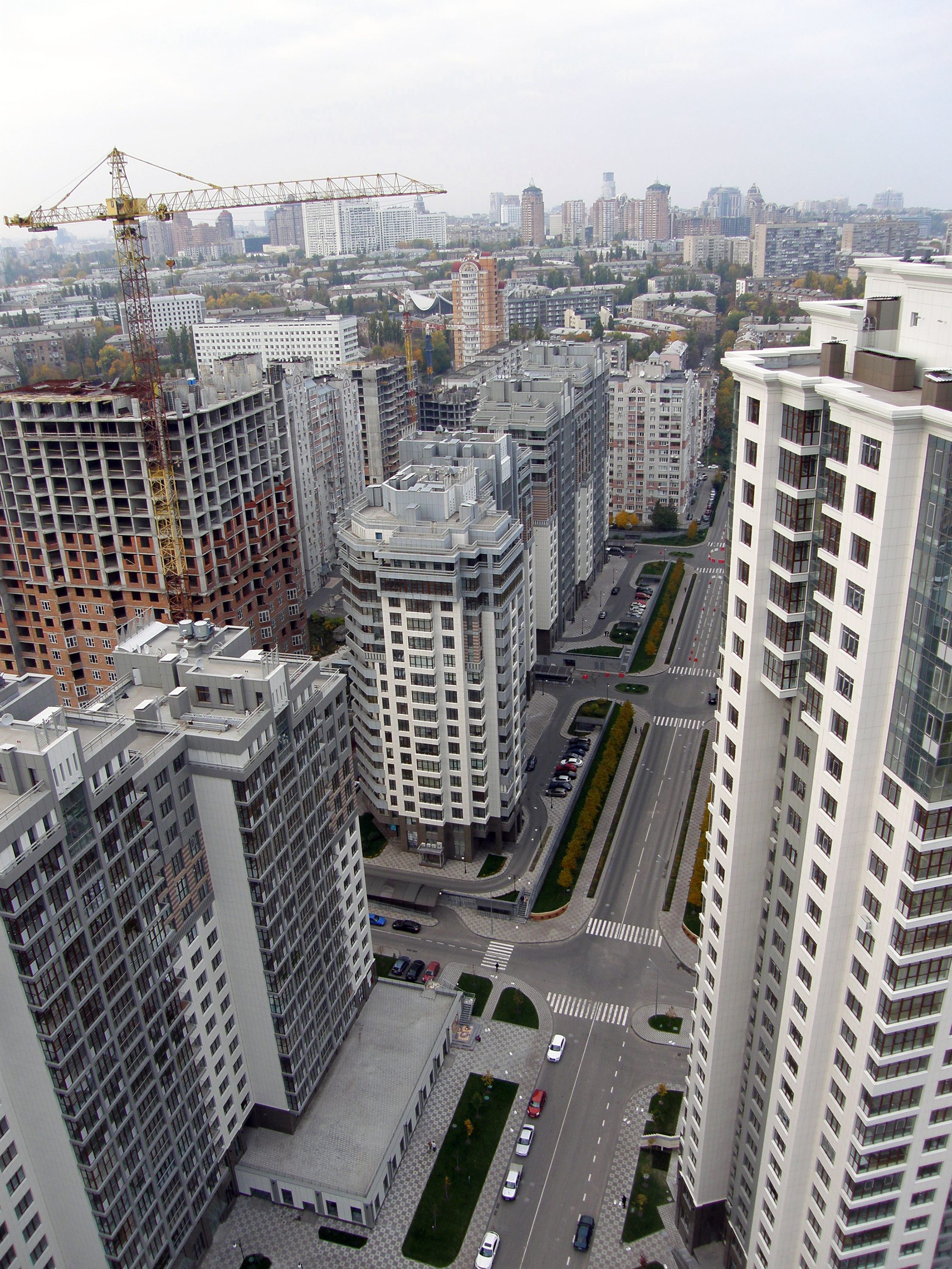 улица Драгомирова